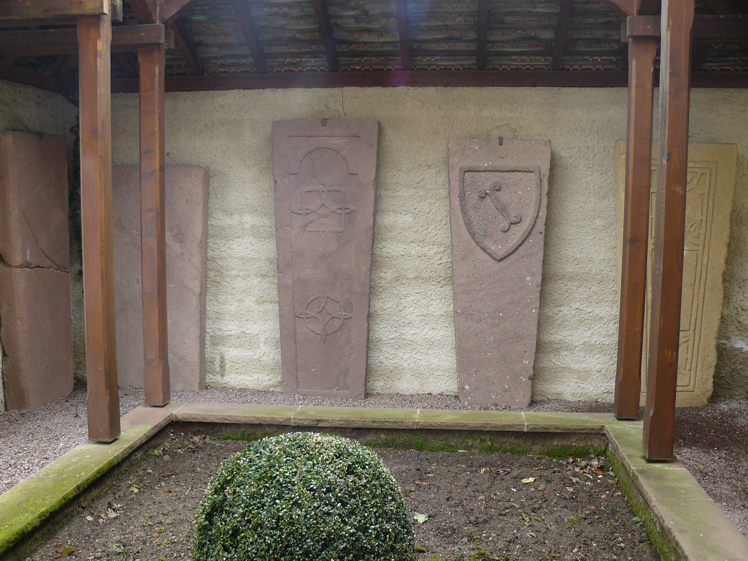 Lapiderium - Vestiges du Couvent de Schwartzenthann